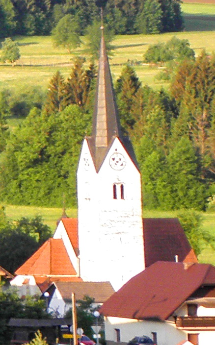 Pogled na Uršljo goro iz Kotelj